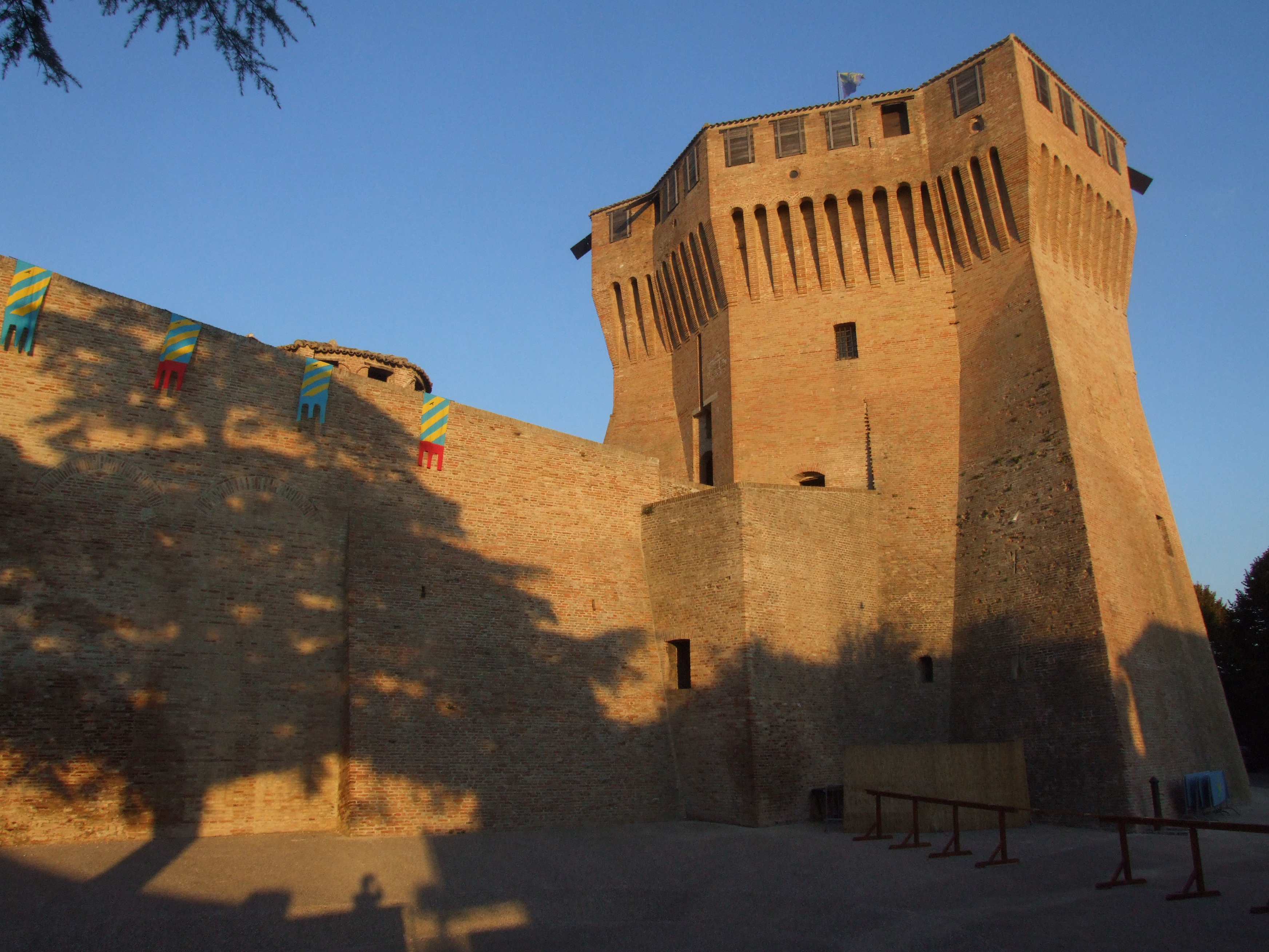 Rocca Roveresca di Mondavio This is a photo of a monument which is part of cultural heritage of Italy.